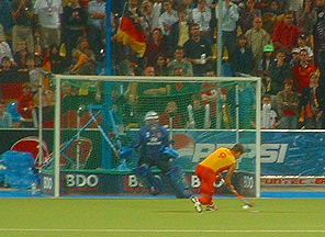 Entscheidender von Ulrich Bubolz gehaltener Siebenmeter beim WM Halbfinalspiel Deutschland-Spanien